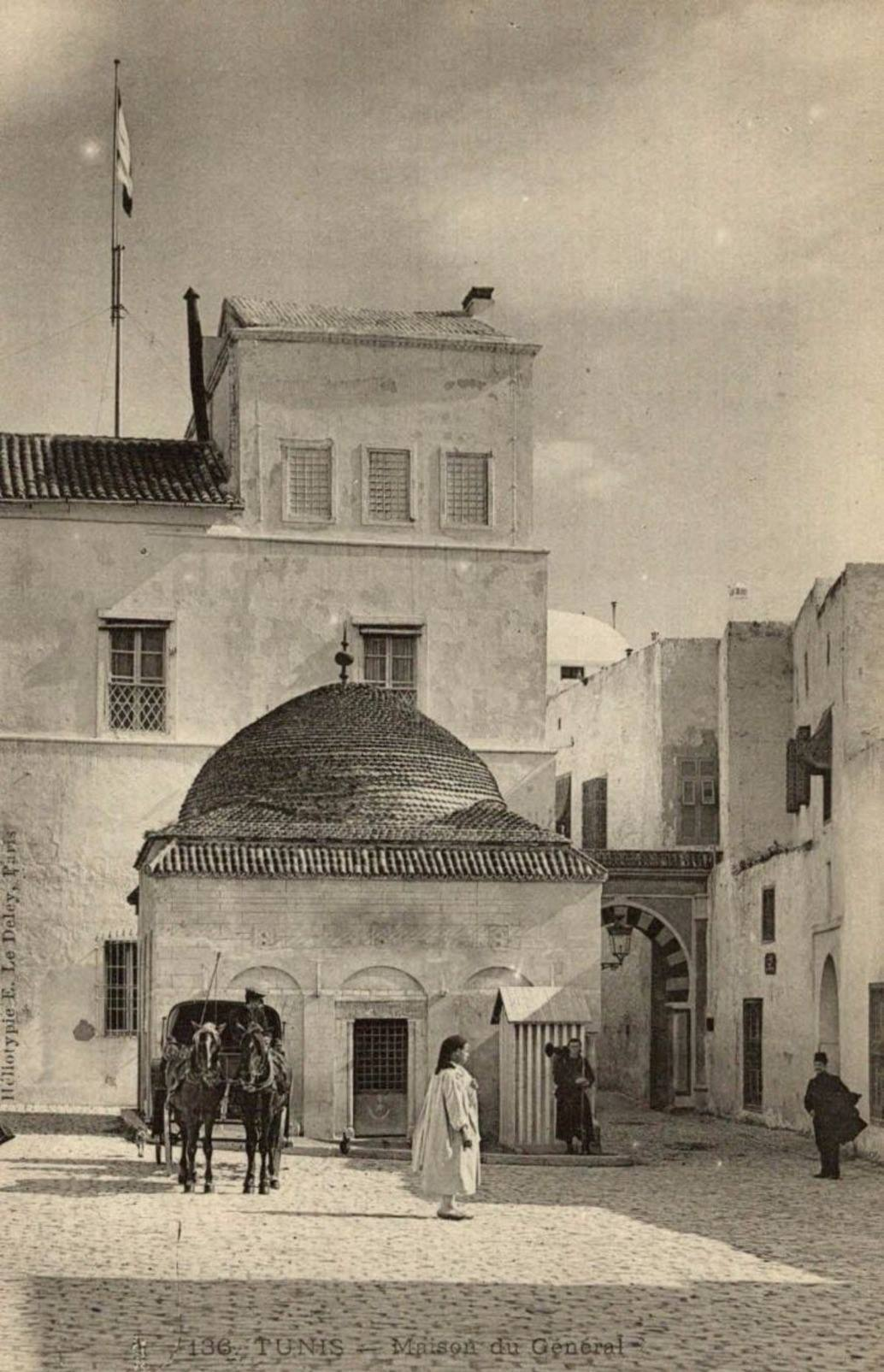 Tourba de Kara Mustafa Dey